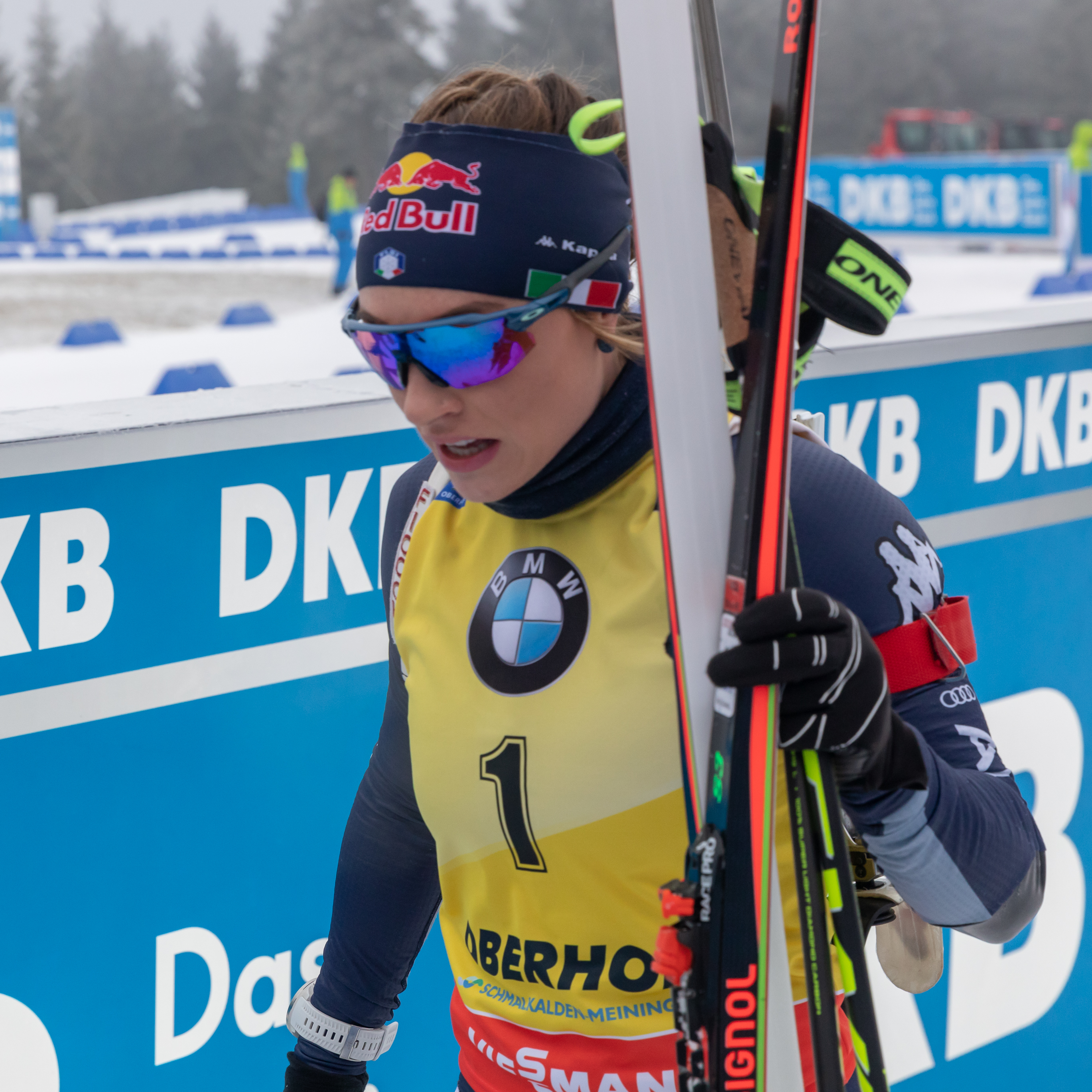 IBU World Cup Biathlon Oberhof; Dorothea Wierer (ITA, Italien) im Ziel